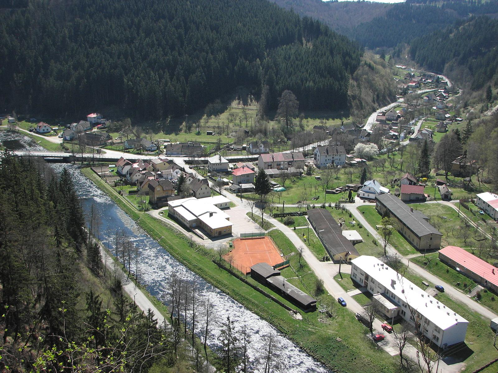 Část obce Vír se skalní vyhlídky Klubačice.